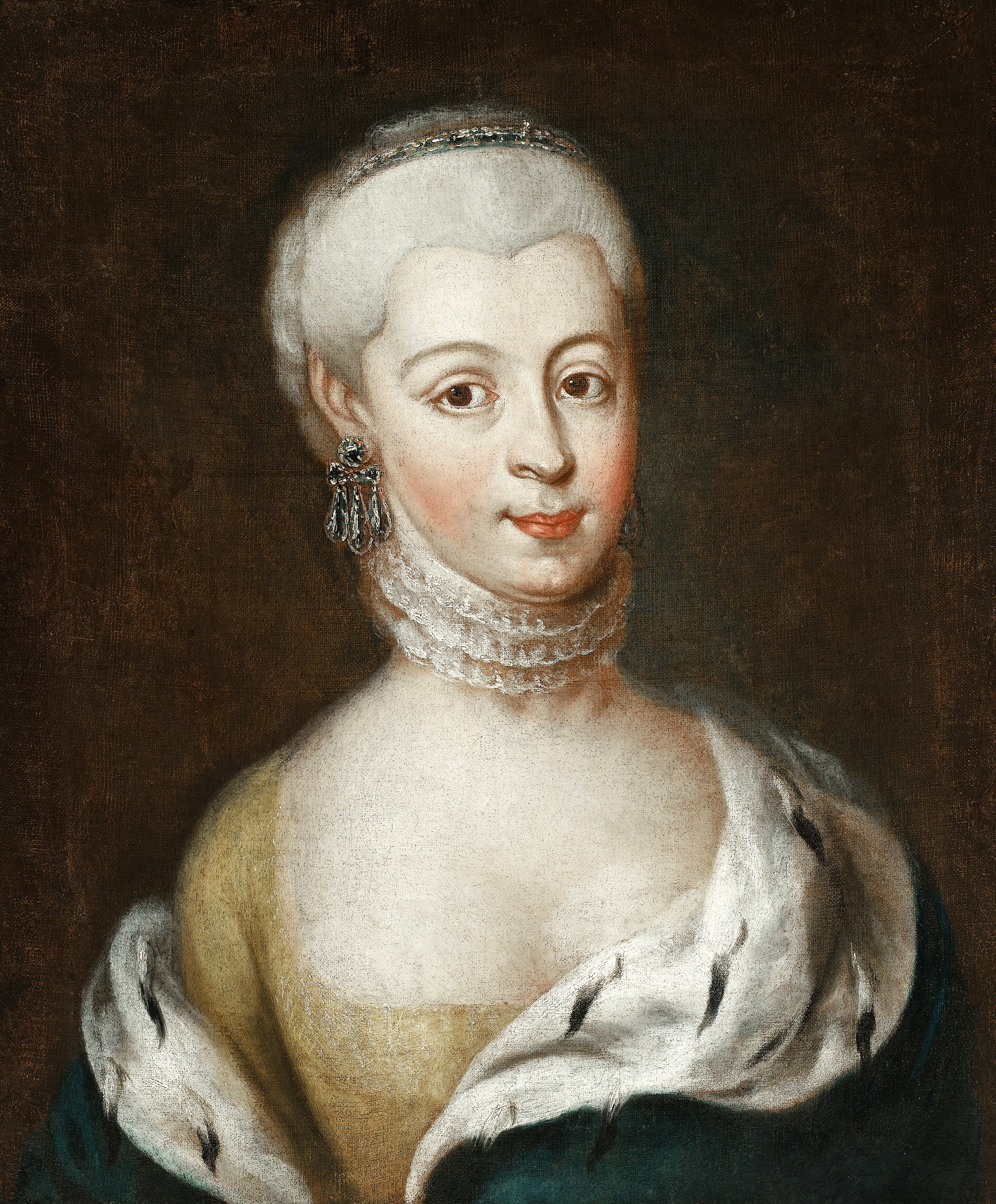 Беларуская (тарашкевіца): Марыя Радзівіл (зь Любамірскіх)